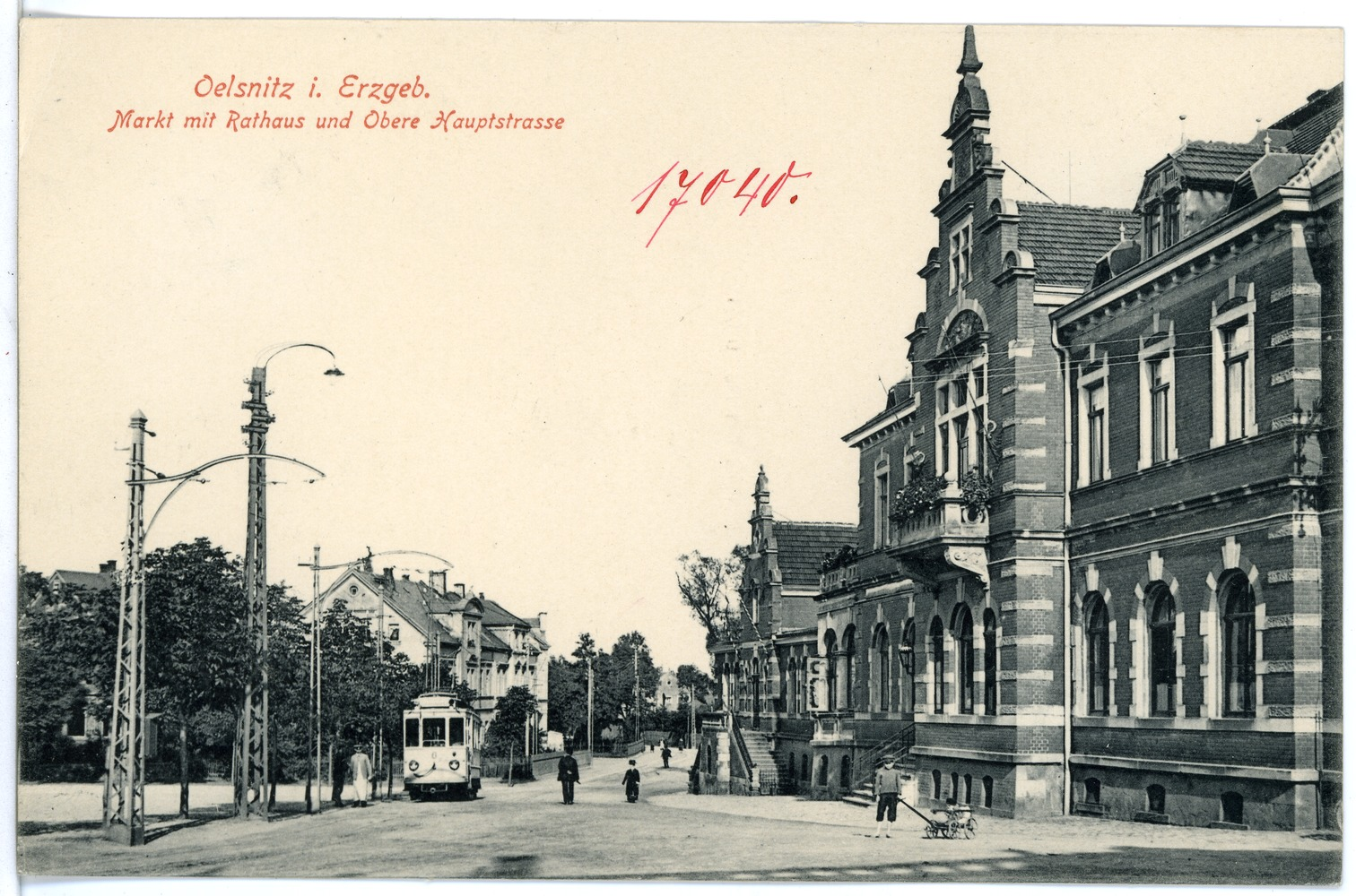 Oelsnitz; Rathaus, Markt und Obere Hauptstraße This postcard is from publisher Brück & Sohn in Meißen ( postcard has a unique number 17040 and is available in a higher resolution at the publisher. This images was uploaded in a cooperation project between Wikipedians and the publisher.